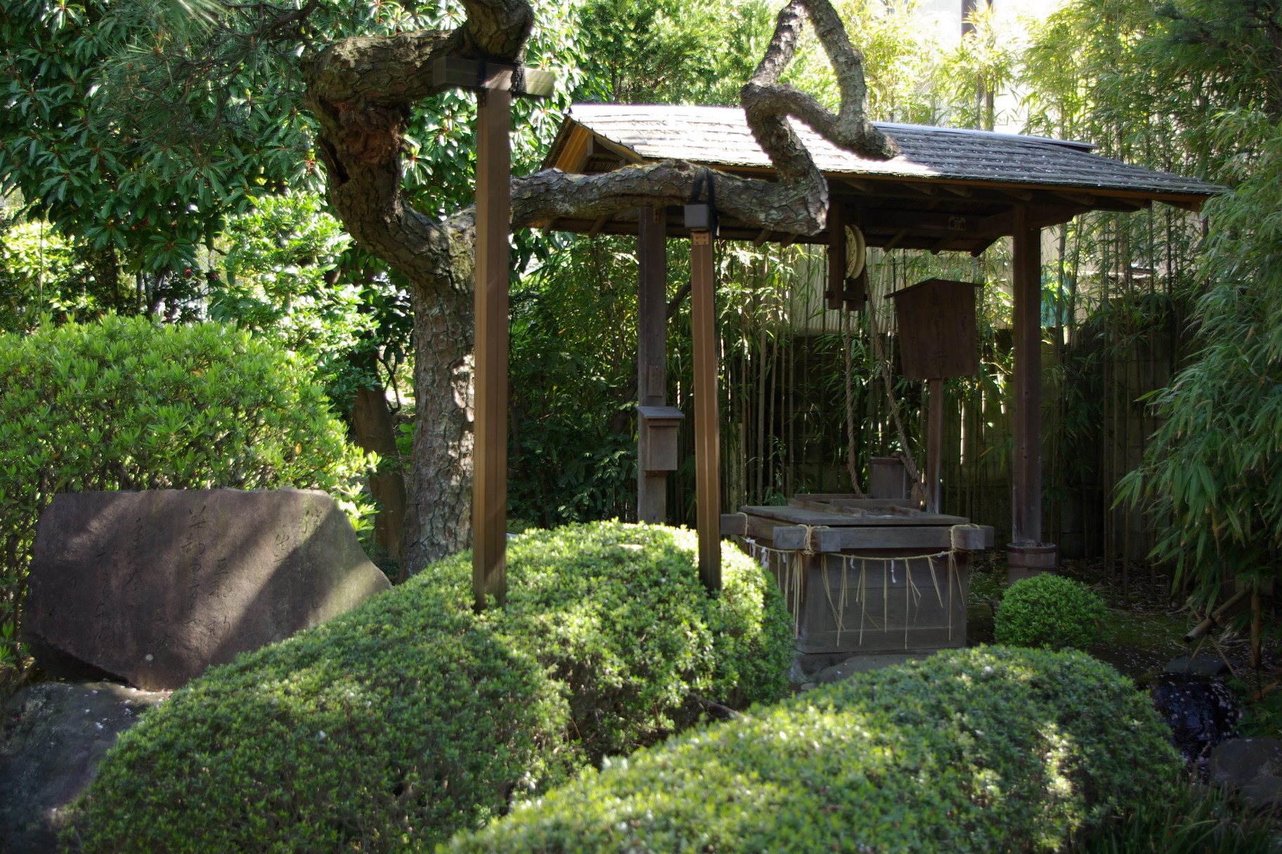 亀井院にある真間の井（千葉県市川市）